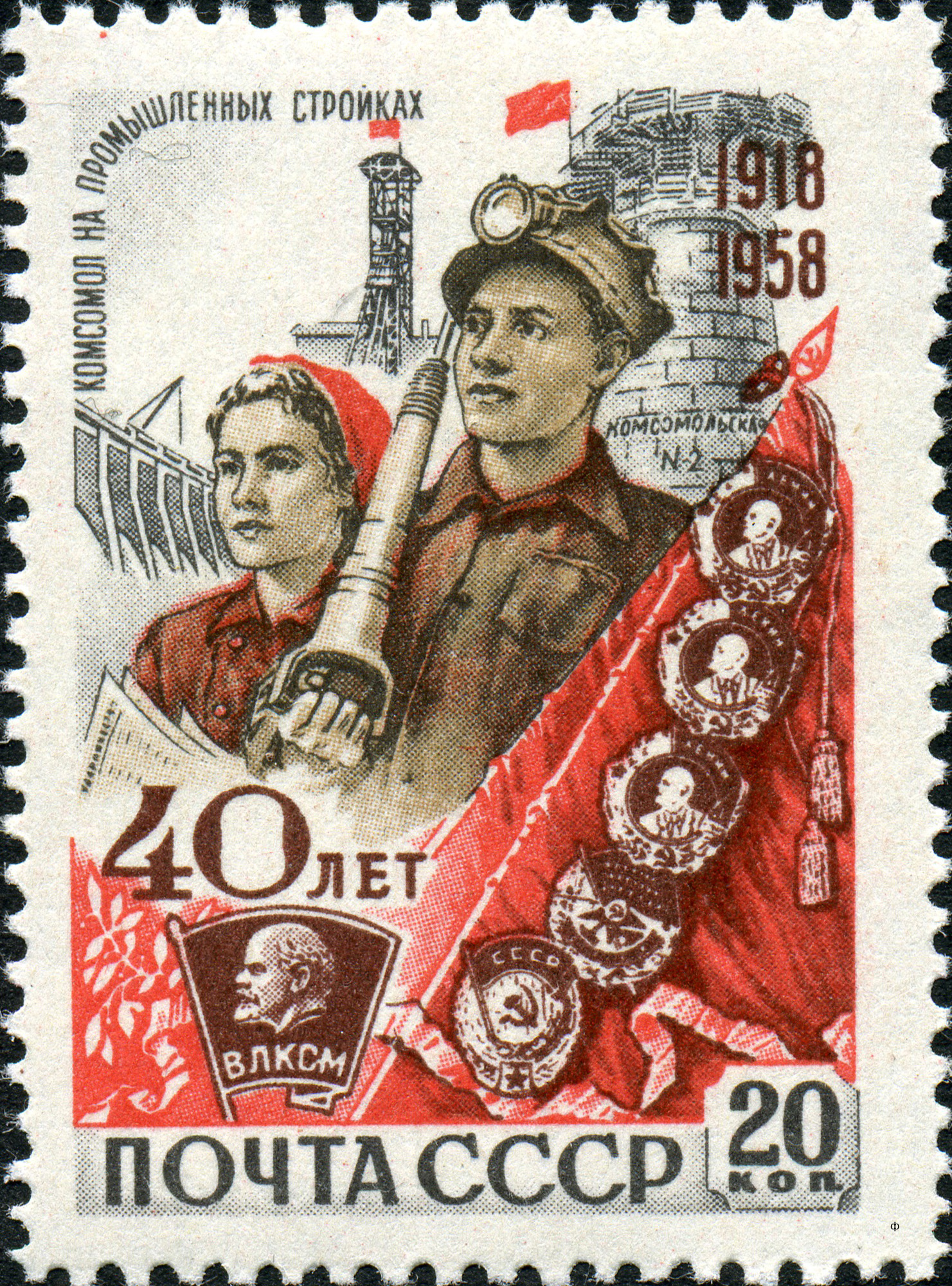 Марка СССР